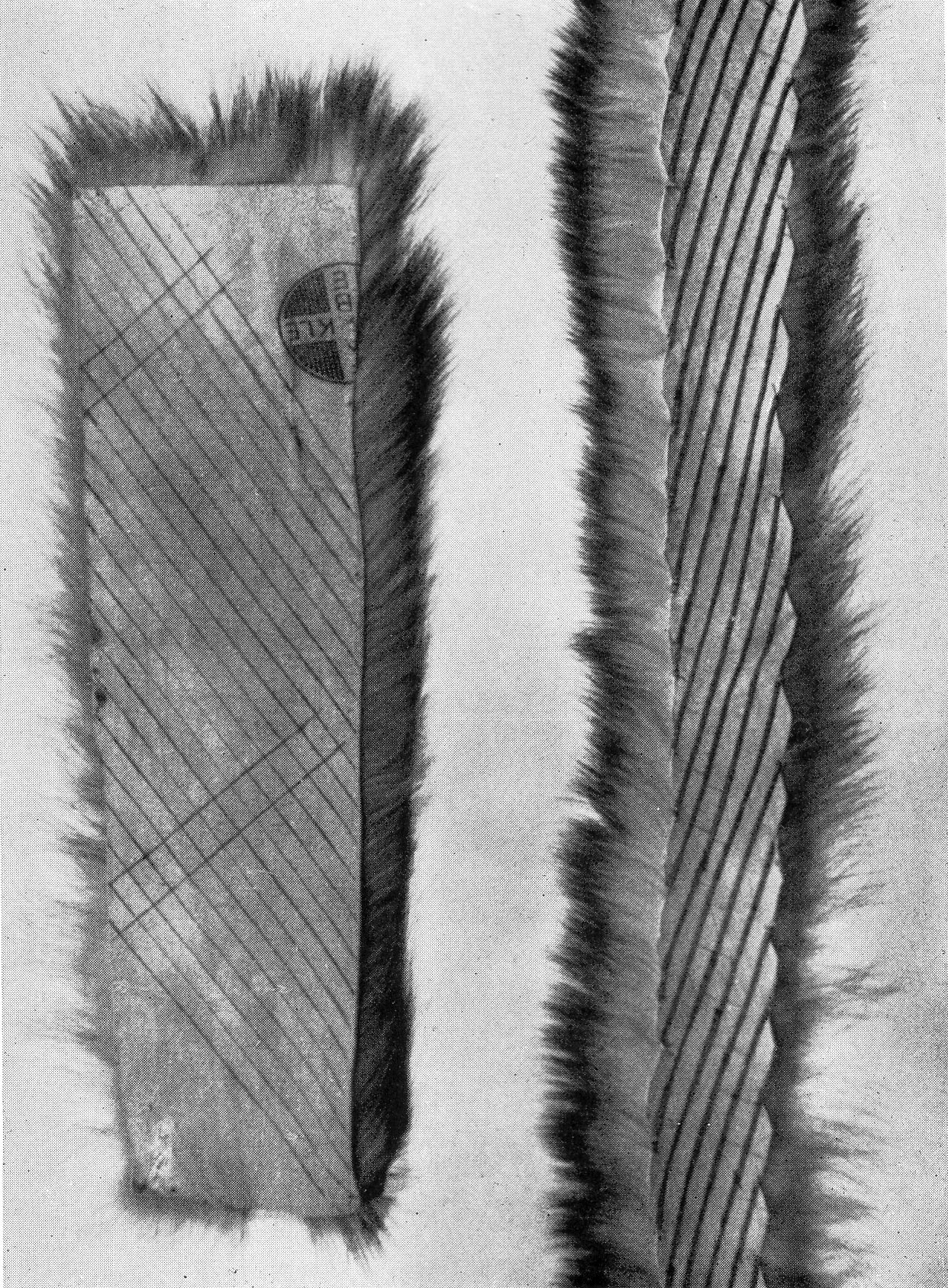 Nähte in der Kürschnerei: Absatz „Auslaß- und Einlaßarbeiten“, Bildunterschrift „Auslassen“.